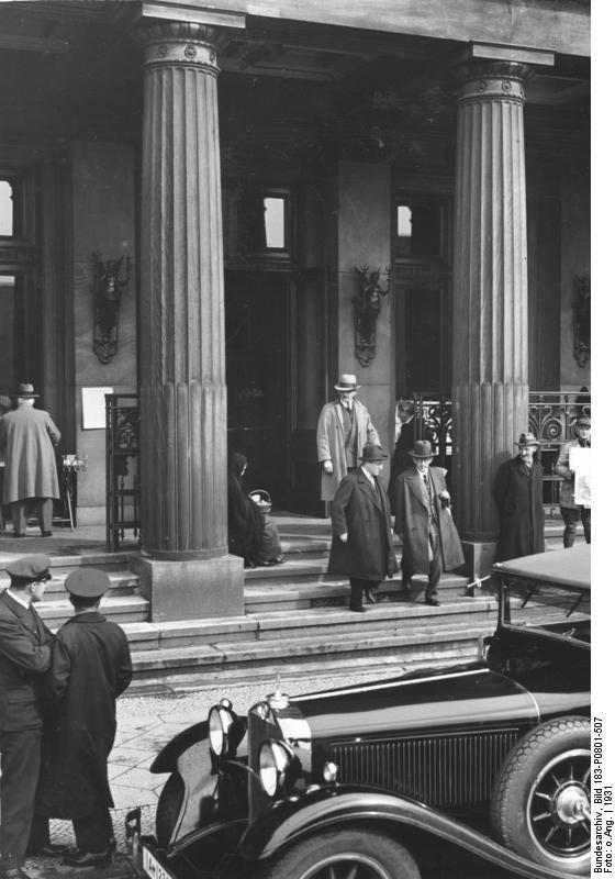 ADN-ZB Berlin Der Eingang zur Börse in der Burgstraße. (Aufnahme: 1931) 31219-31